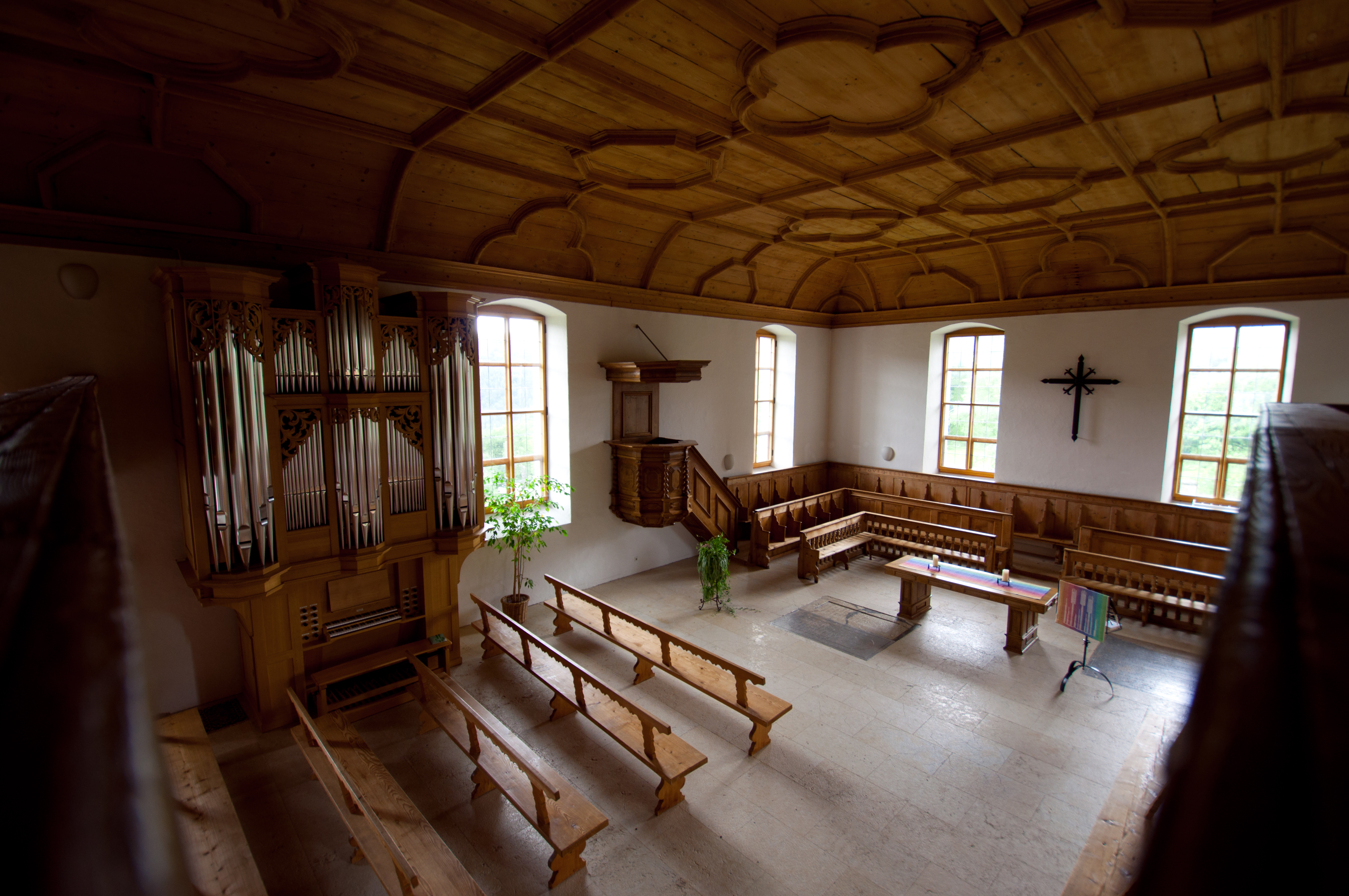 Reformierte Kirche (Intérieur)